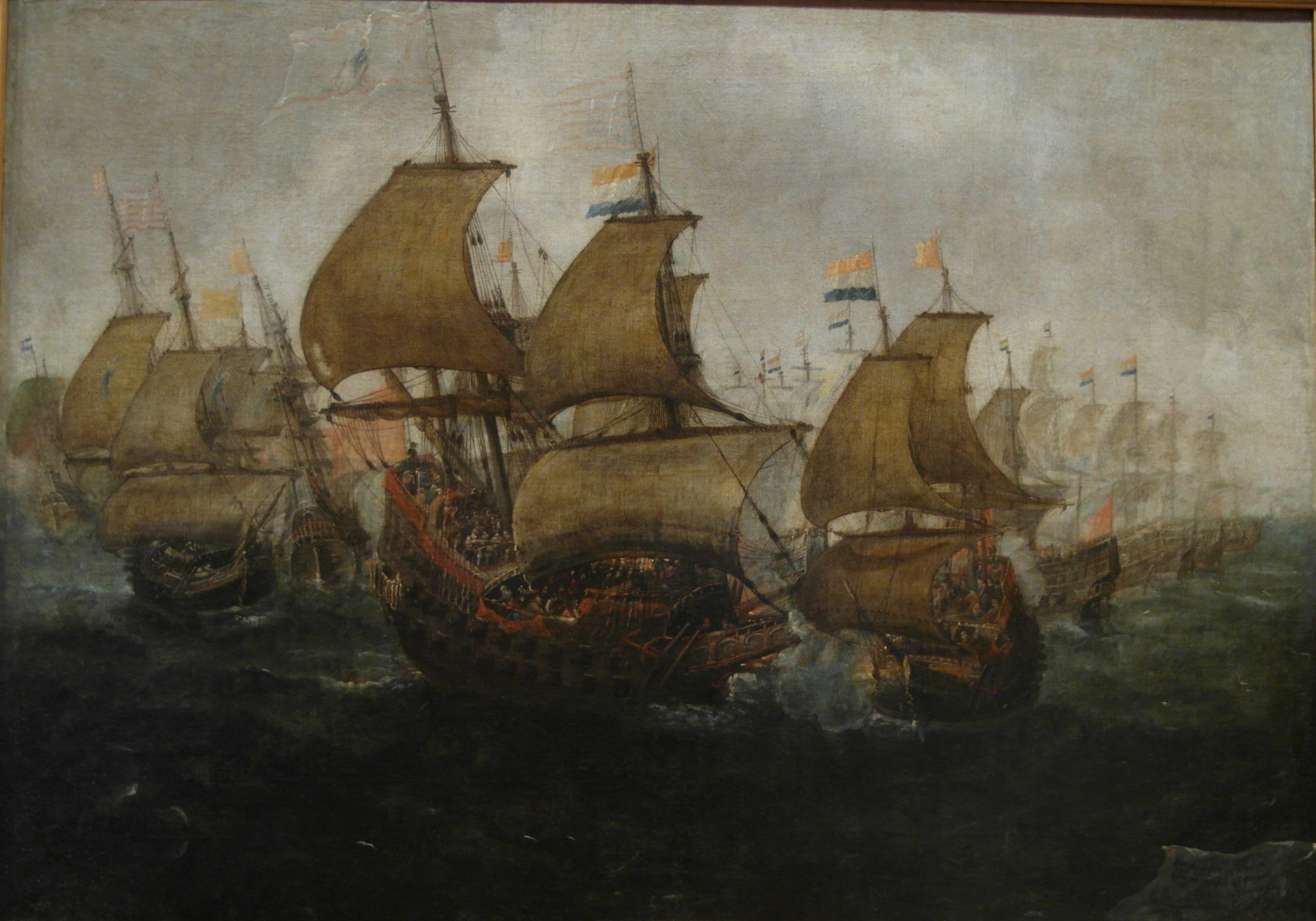 Batalla naval de Gibraltar, victoria de Fadrique de Toledo sobre la escuadra holandesa, 10 de agosto de 1621.